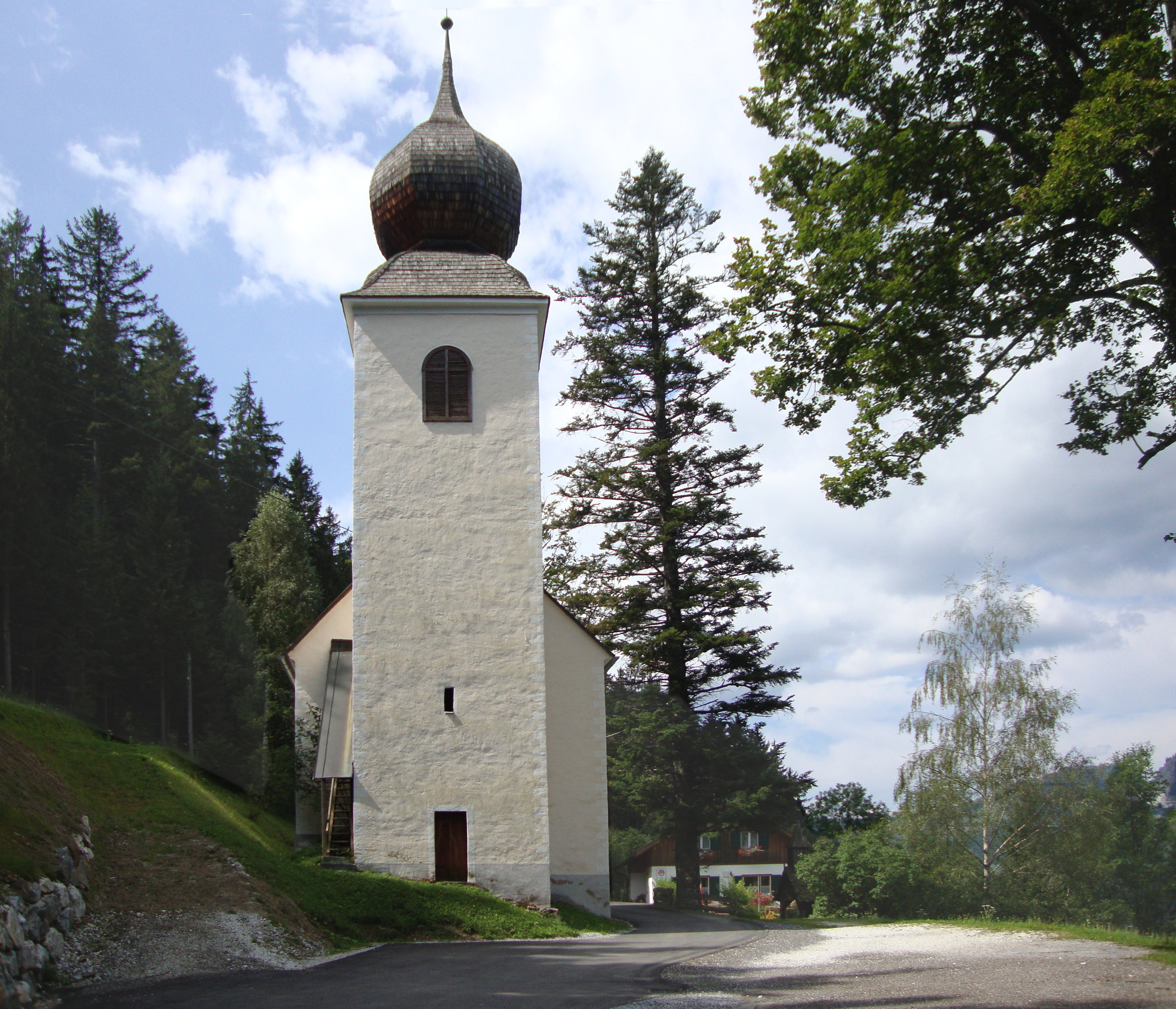 Tanne (Abies alba) und Filialkirche St. Radegund am heiligen Wasser This media shows the natural monument in Styria with the ID 1213.